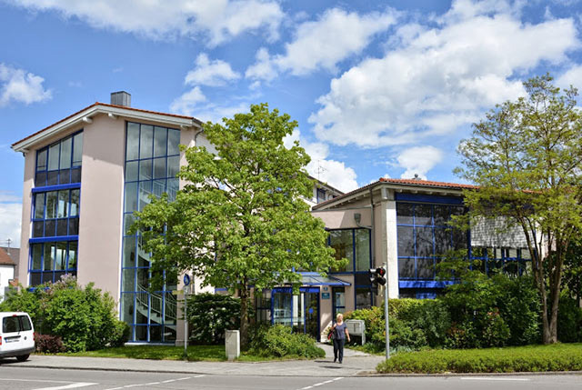 Sitz der Hauptverwaltung von KWA Kuratorium Wohnen im Alter, in 82008 Unterhaching, Biberger Straße 50